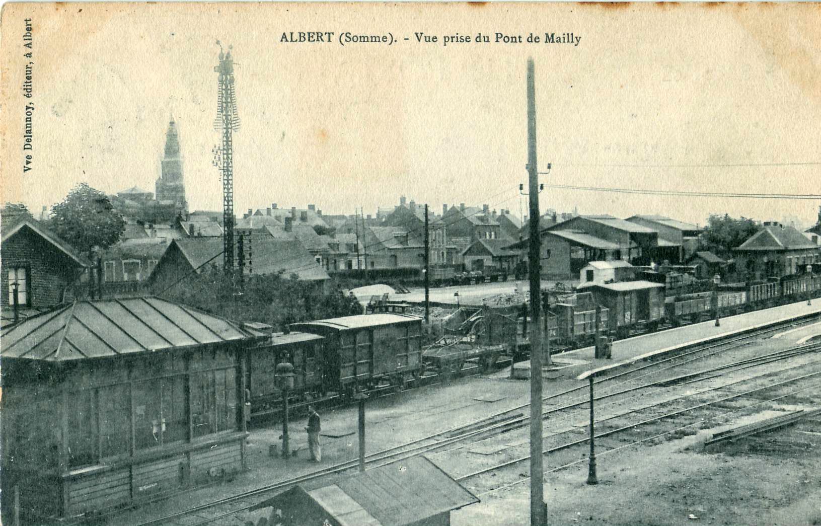 Carte postale ancienne éditée par Veuve Delannoy à Albert : ALBERT - Vue du Pont de Mailly